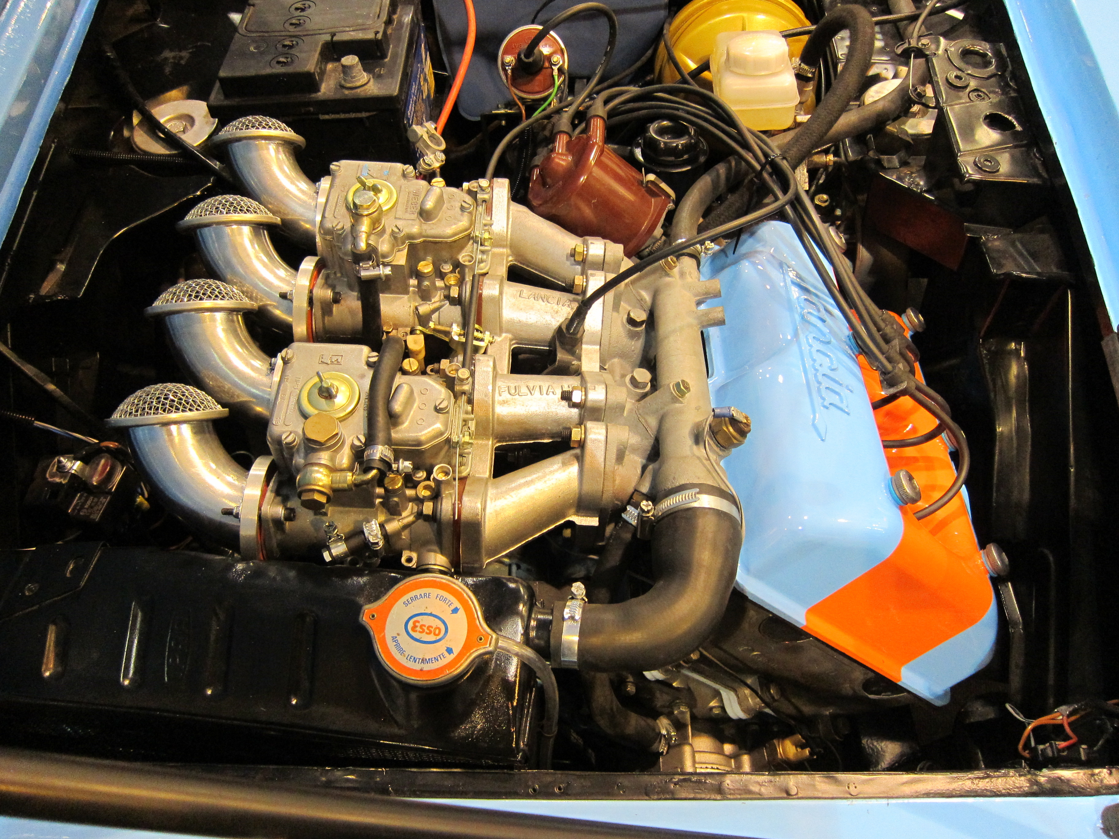 Techno Classica 2012